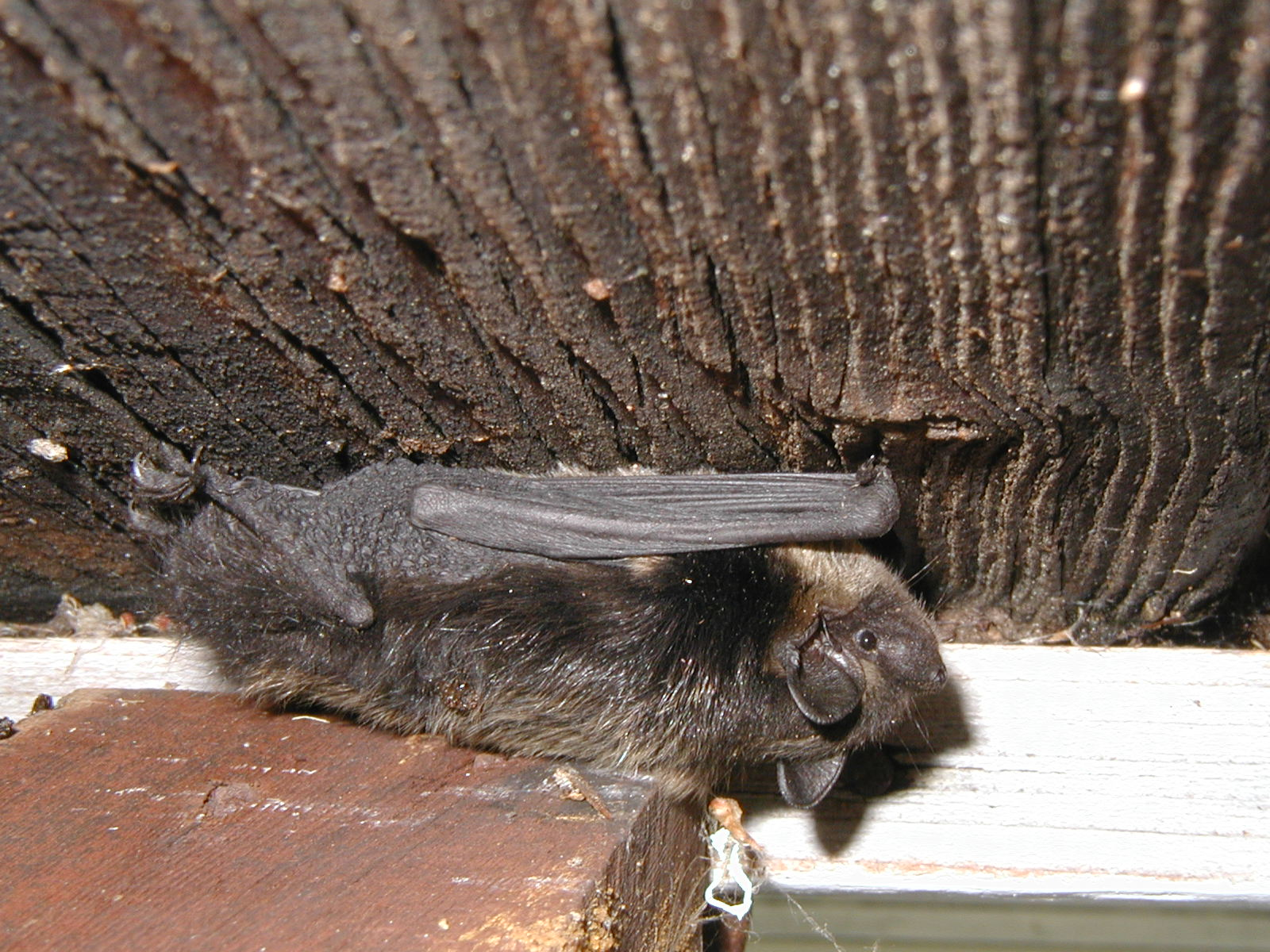 An Estonian bat